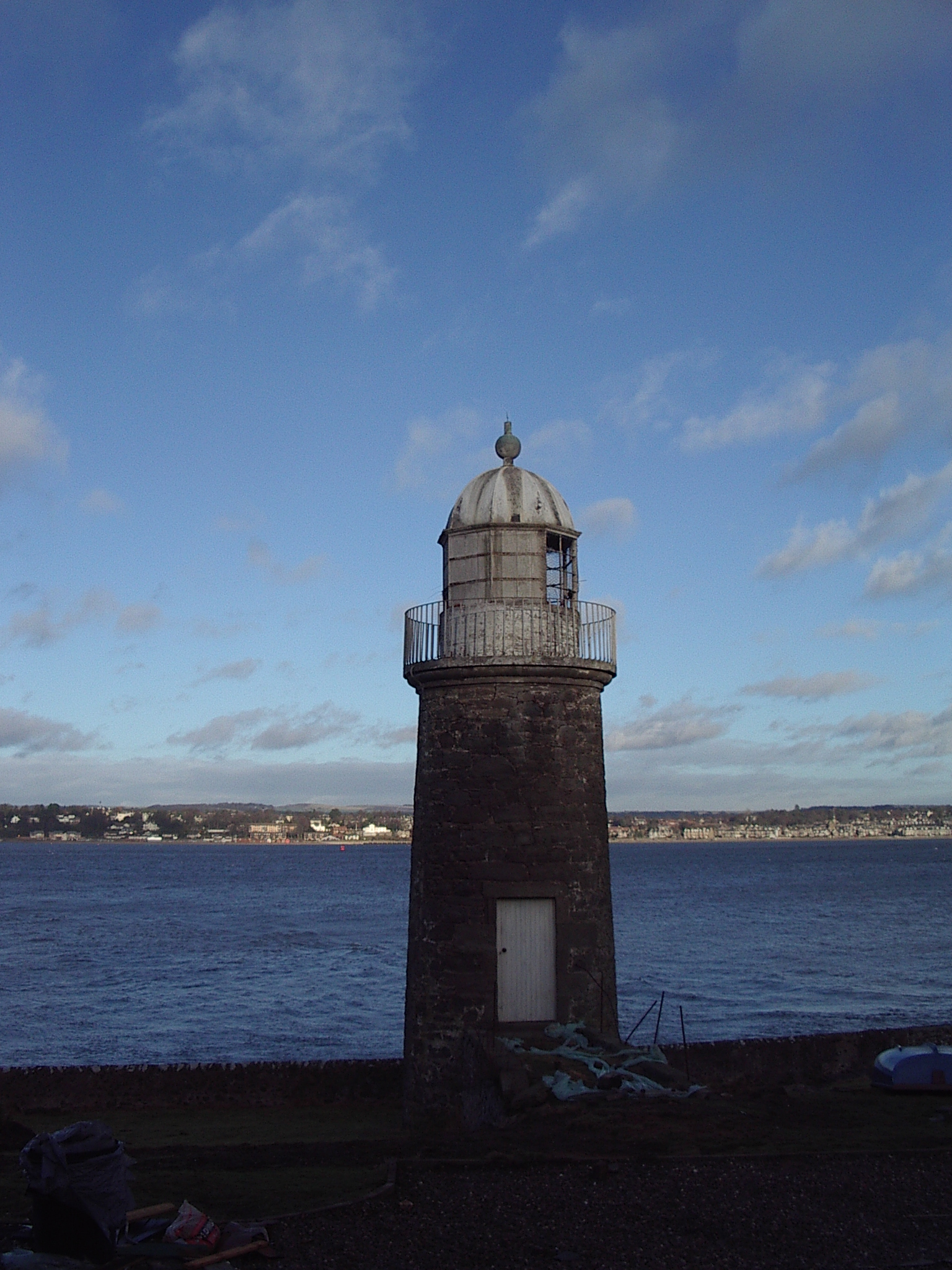 Faro de Tayport East o también conocido como de Tayport Low